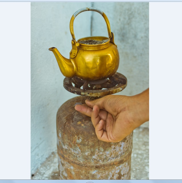 إعداد الشاي على قنينة غاز صغيرة